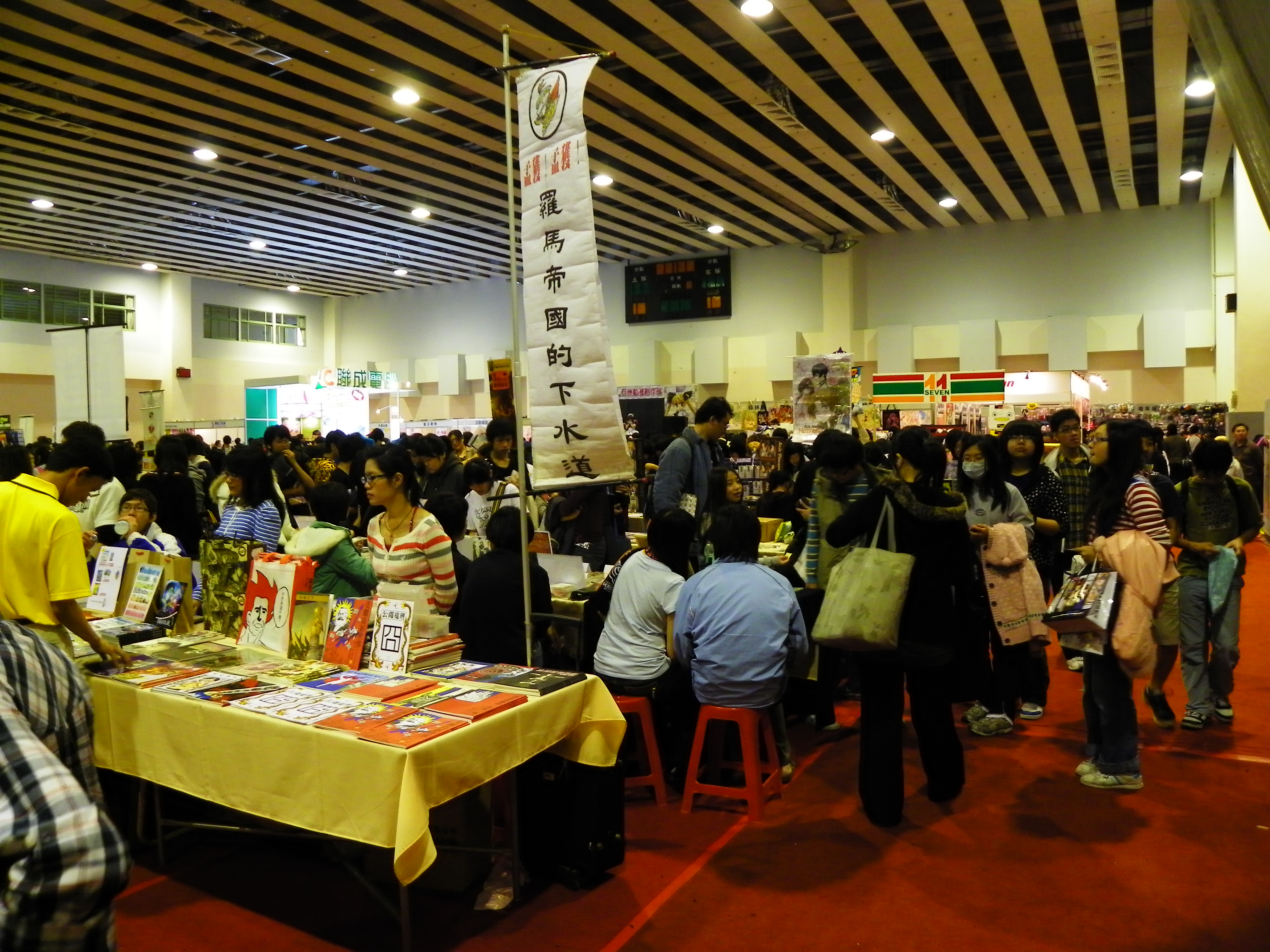 中文（台灣）: Peit Fronter 12 一樓會場一景。